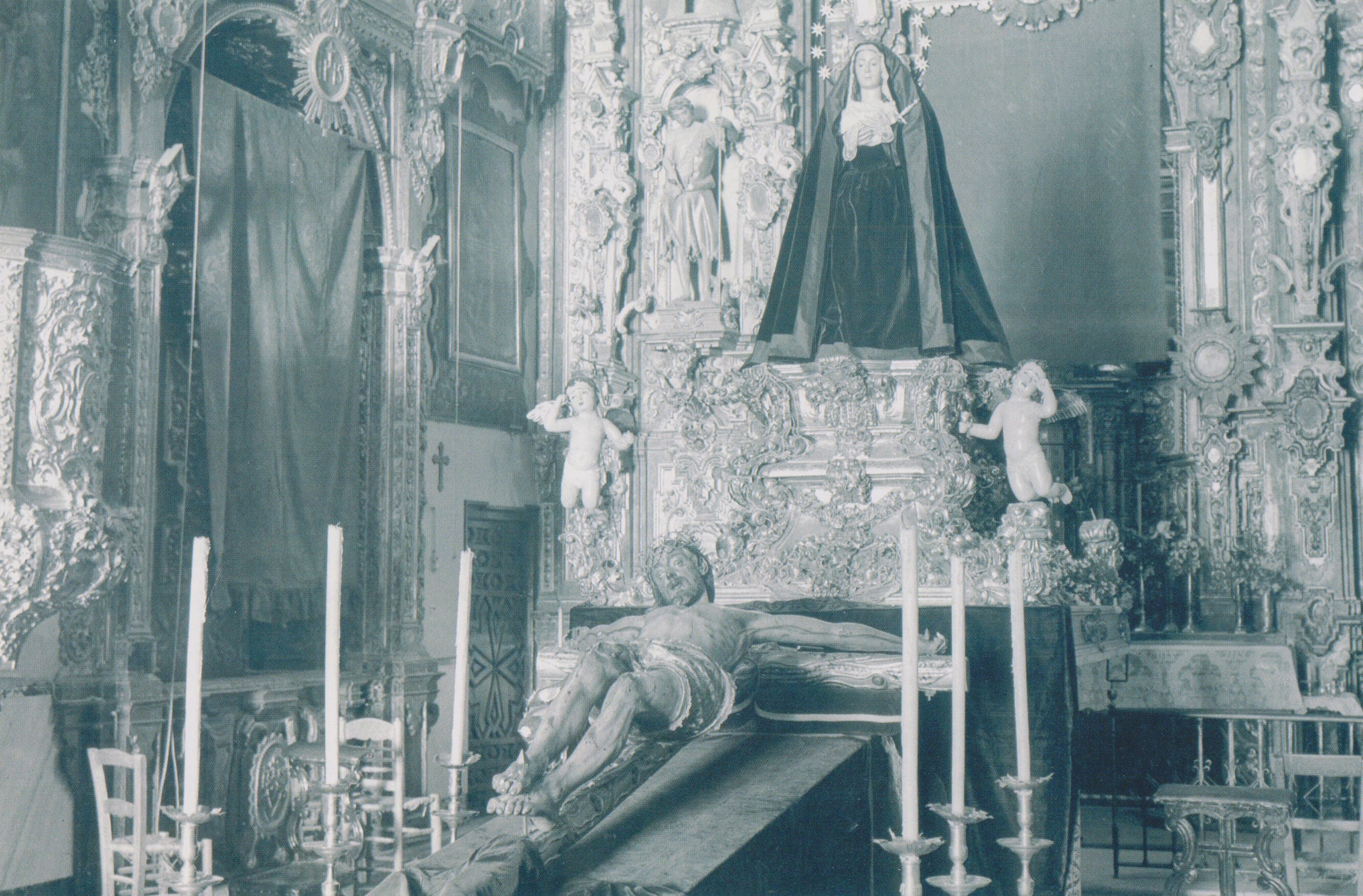 La Virgen de la Paz con el Santísimo Cristo de la Sangre vestida de dolorosa sobre una magnifica peana-Trono rondeño.